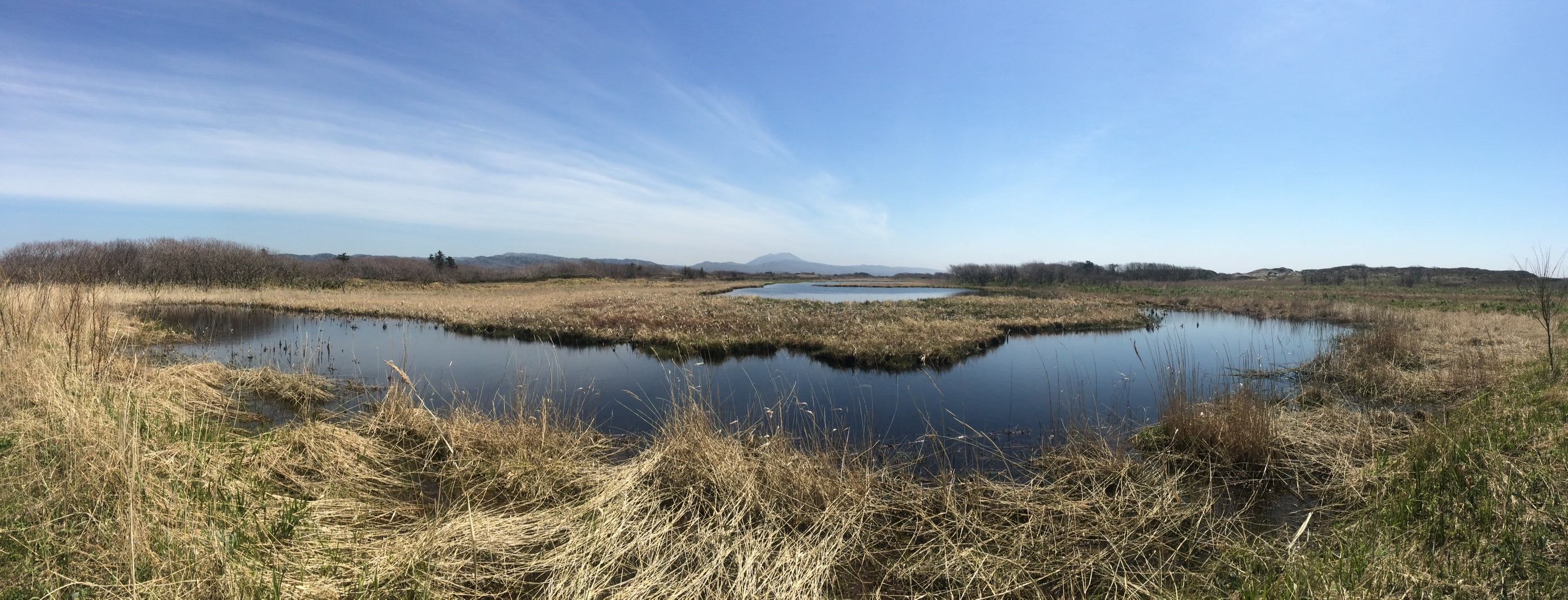 Мыс Слепиковского, Холмский городской округ This image is related to the protected area of Russia number 6510075